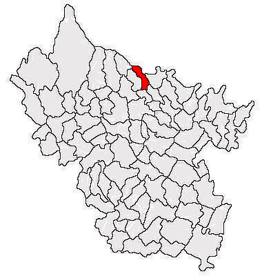 Categorie:Hărţi ale judeţului Buzău